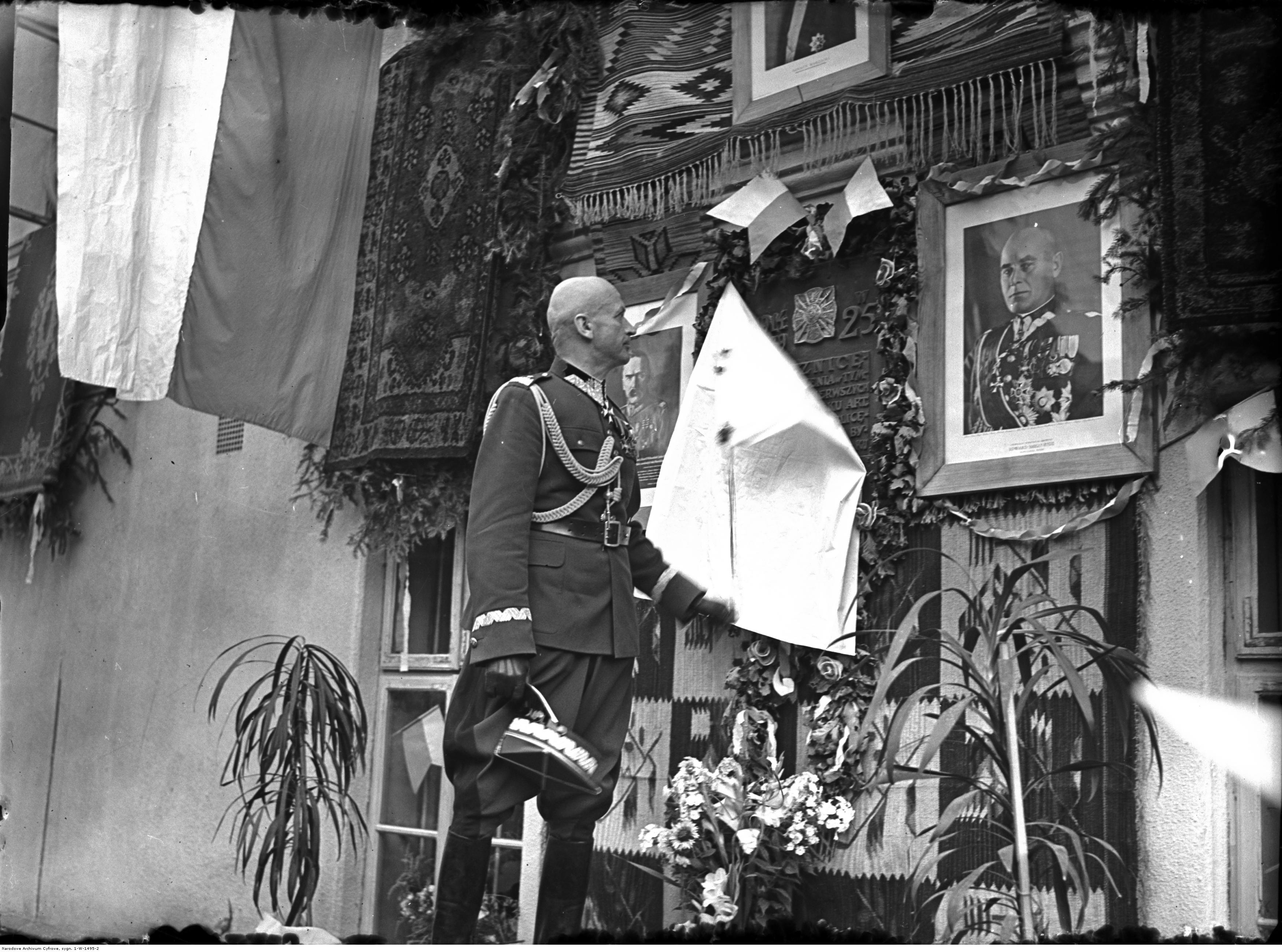 Odsłonięcie tablicy pamiątkowej na budynku koszar 6 Pułku Artylerii Lekkiej w Przegorzałach z okazji XXV - lecia czynu legionowego. Gen. bryg. Mieczysław Maciejowski odsłania tablicę. Koncern Ilustrowany Kurier Codzienny - Archiwum Ilustracji. Sygnatura: 1-W-1495-2